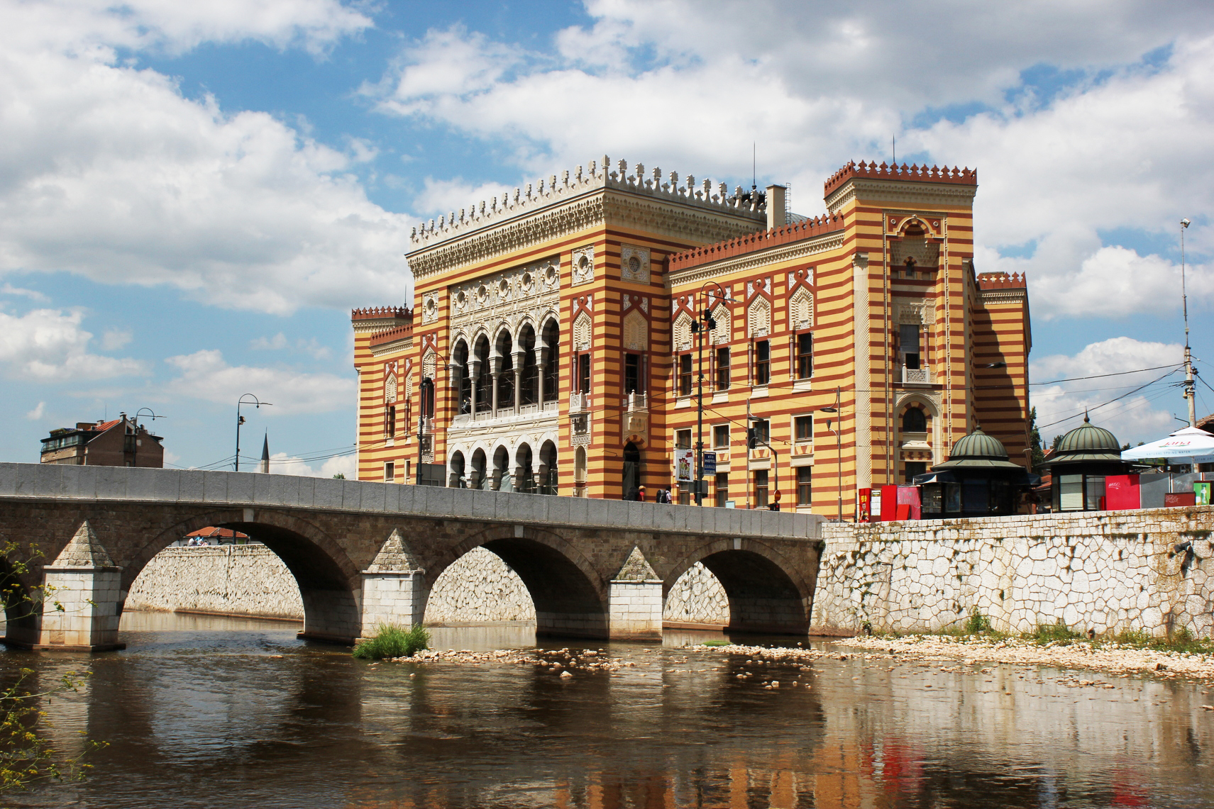 Die Alte Nationalbibliothek in Sarajevo nach der Außensanierung im Jahr 2013.Hornjoserbsce: Stara narodna knihownja w Sarajewje po saněrowanju w lěće 2013.